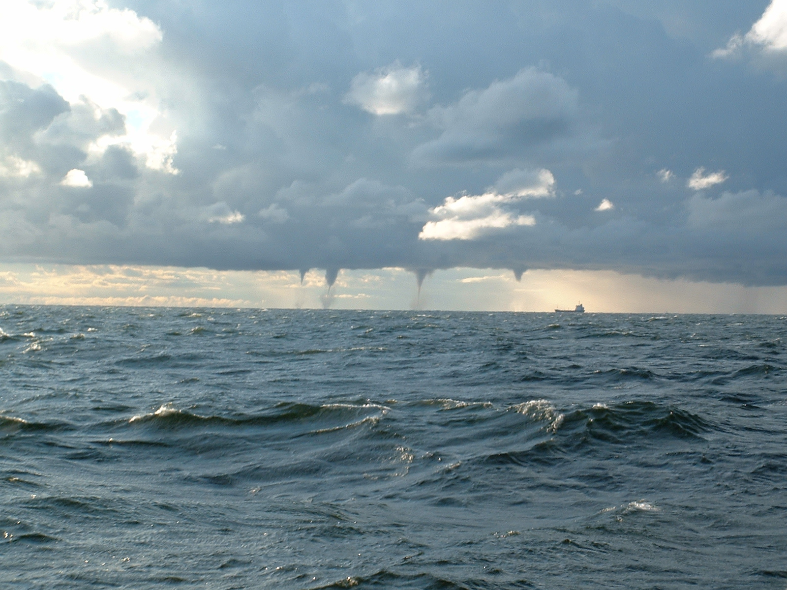 Trąba wodna na Bałtyku.